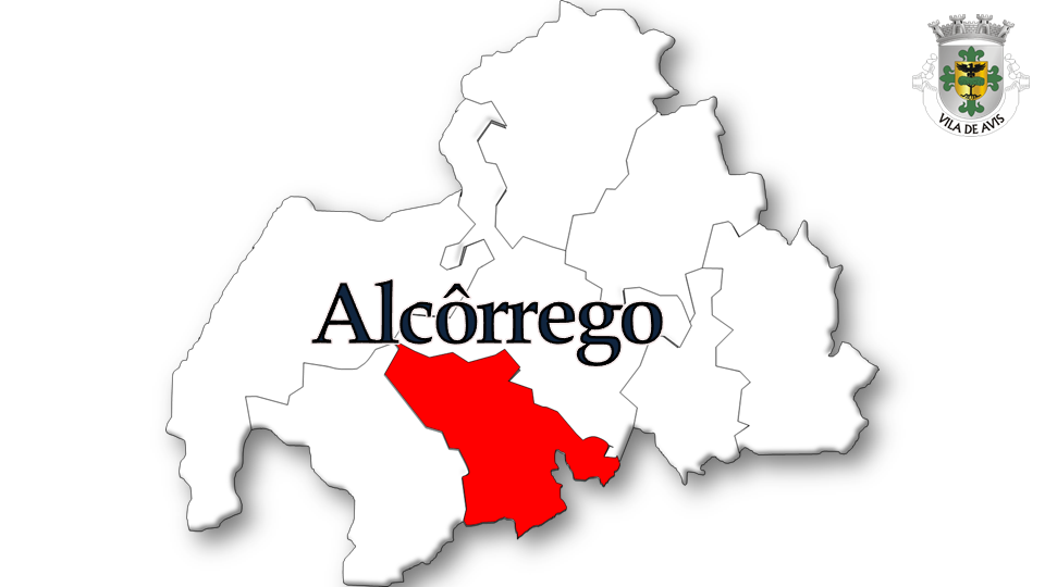 Evolução da População